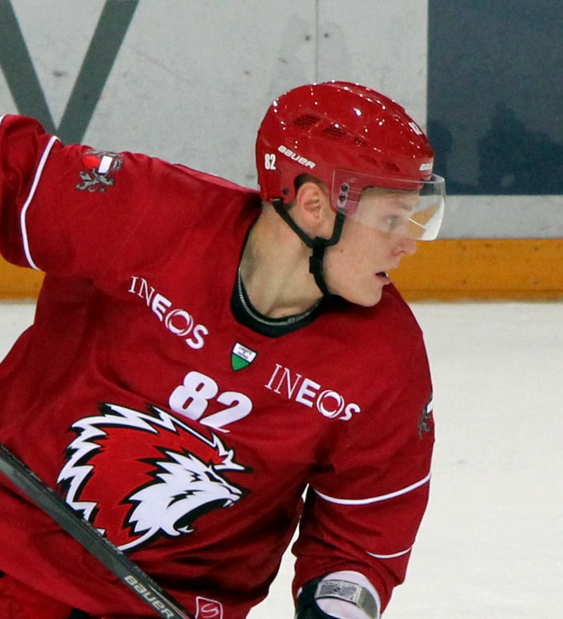 Harri Pesonen (L 82).